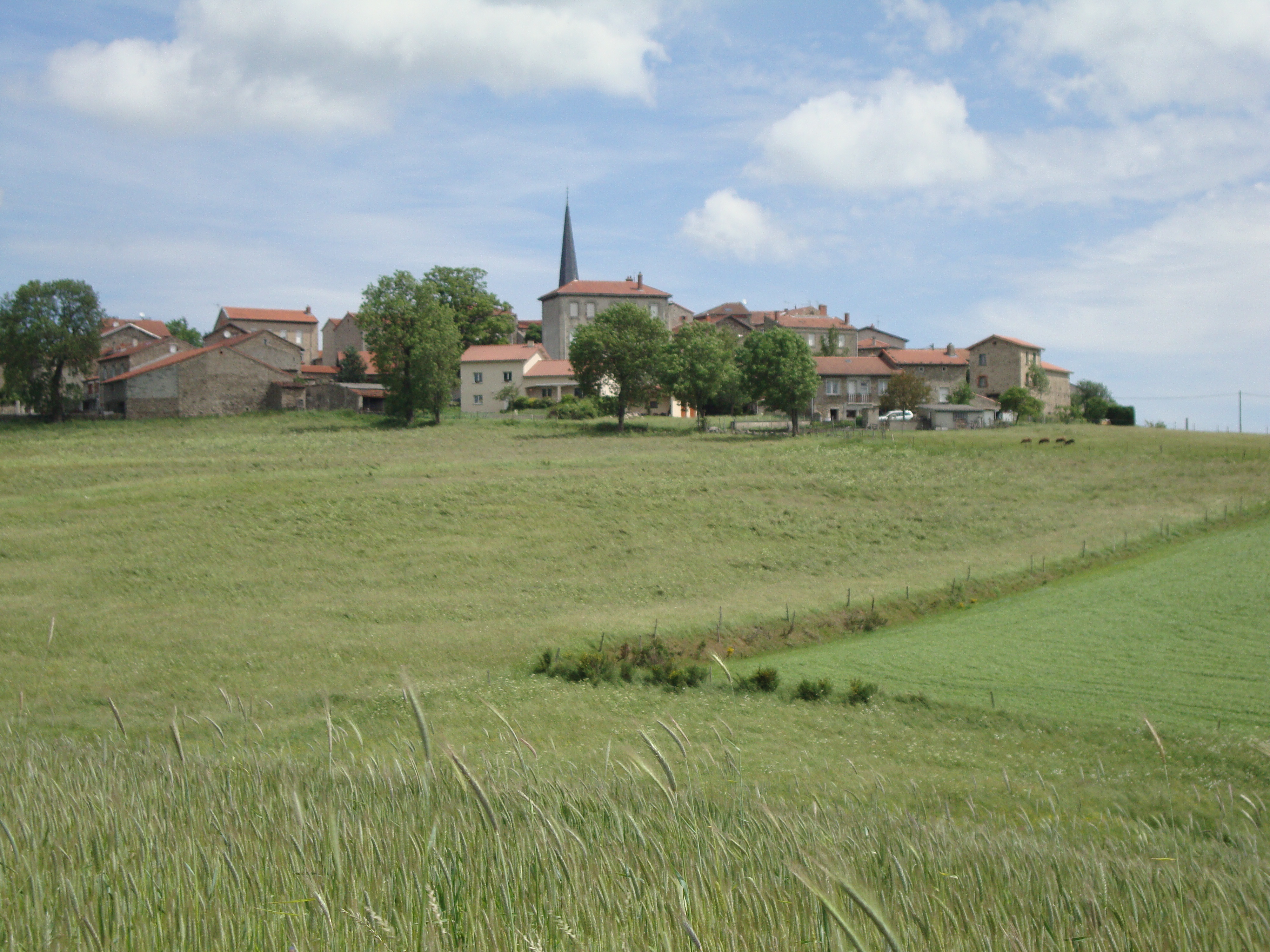 St.Victor-Malescours (Haute-Loire, Fr) paysage avec vure sur le village